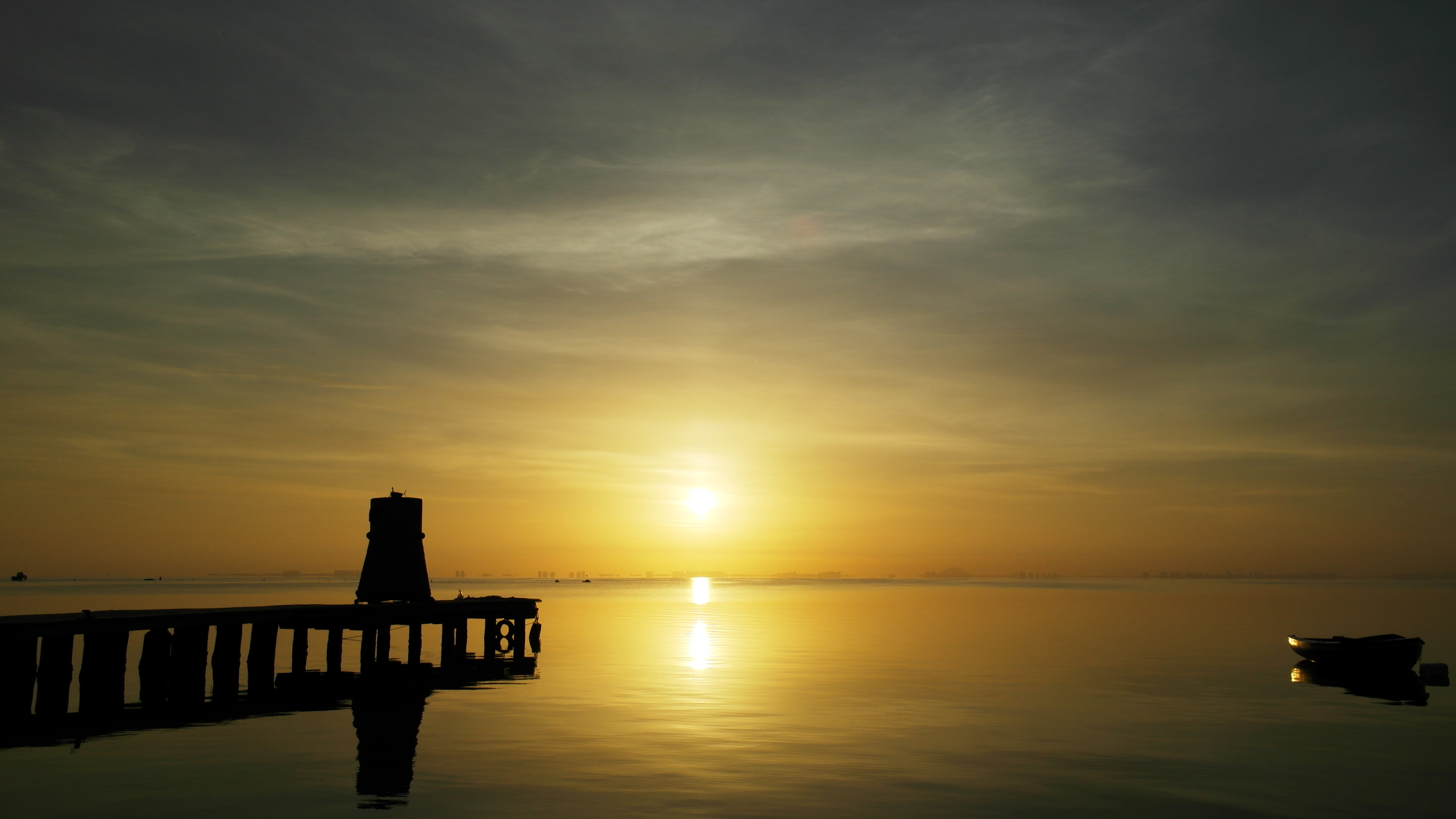 Mar Menor This is a photography of a Special Area of Conservation in Spain with the ID: ES6200030. Natura2000 entry, EEA entry